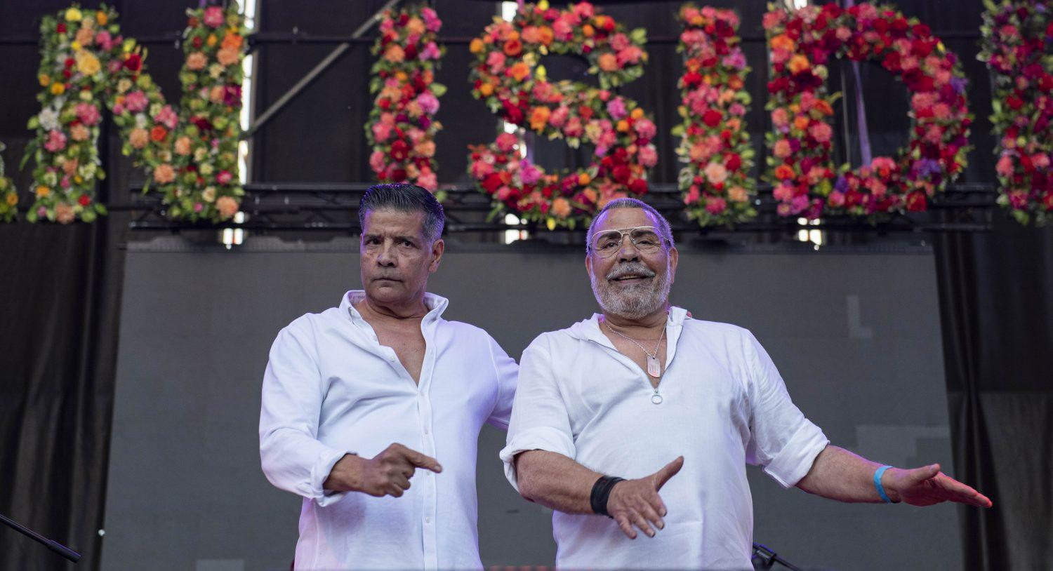 Los sonidos más rumberos se apoderaron ayer de la noche madrileña. Miles de personas abarrotaron los escenarios, a un lado y a otro del río.